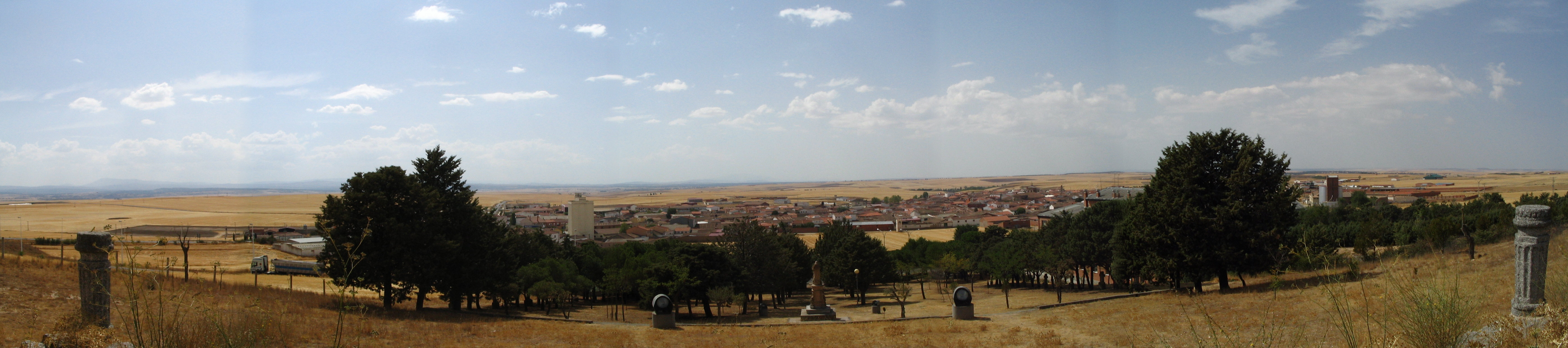 Vista de Macotera desde el Cerro